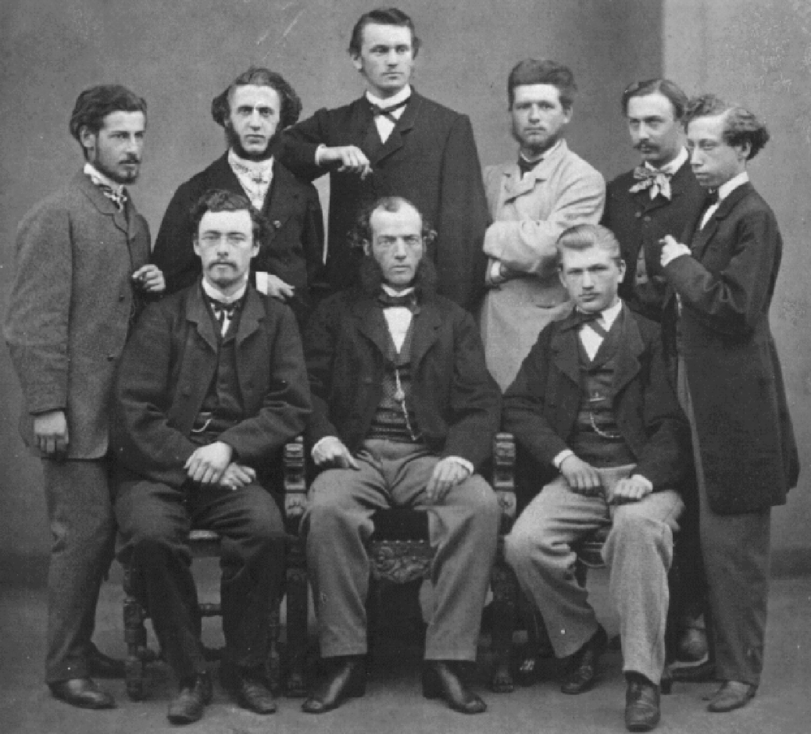 Kekule und Mitarbeiter in Gent (Belgien), - stehend, v.l.n.r. August Mayer (1-2 Jahre jüngerer Bruder von Adolf Mayer (*1843 in Oldenburg; †1942), der zuvor 1864 bei Kekule in Gent war) Dr. Wilhelm Körner (* 20. April 1839 in Kassel; † 29. März 1925 in Mailand), Assistent bei Kekule 1865-1867 Esch Semmel Behrend Albert Ladenburg (* 2. Juli 1842 in Mannheim; † 15. August 1911 in Breslau), 6 Monate bei Kekule - sitzend, v.l.n.r. Dr. Théodore Swarts (* 9. Mai 1839, Antwerpen, Belgien; † 31. August 1911, Kortenberg, Belgien); Swarts wurde 1867 Nachfolger von Kekule in Gent.[1] Prof. August Kekulé (* 7. September 1829 in Darmstadt; † 13. Juli 1896 in Bonn), [2] Dr. Carl Glaser (* 27. Juni 1841 in Kirchheimbolanden; † 25. Juli 1935 in Heidelberg), Assistent bei Kekule 1865-1867. Er folgte Kekule 1867 nach Bonn.